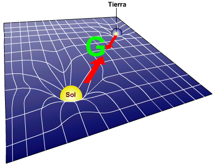 Descripción: Interacción de la fuerza de gravedad. Autor: Luis María Benítez. Enlaces relacionados: Teoría de la Relatividad Especial, Albert Einstein, gravitón. Dibujos - enlaces útiles: Cómo dibujar (LMB) y Dibujos de LMB. Categoría:Física (imagen)